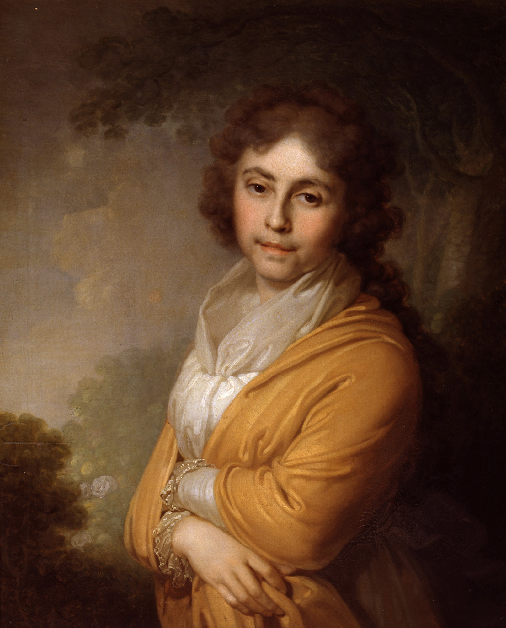 Наталья Ивановна Куракина (1768-1831), урожденная Головина – кавалерственная дама ордена Святой Екатерины, статс-дама, супруга министра внутренних дел